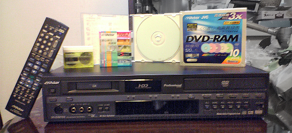 投稿者自身が所有している映像機器のひとつである日本ビクター製ビデオテープレコーダ「SR-DVM700」を撮影。